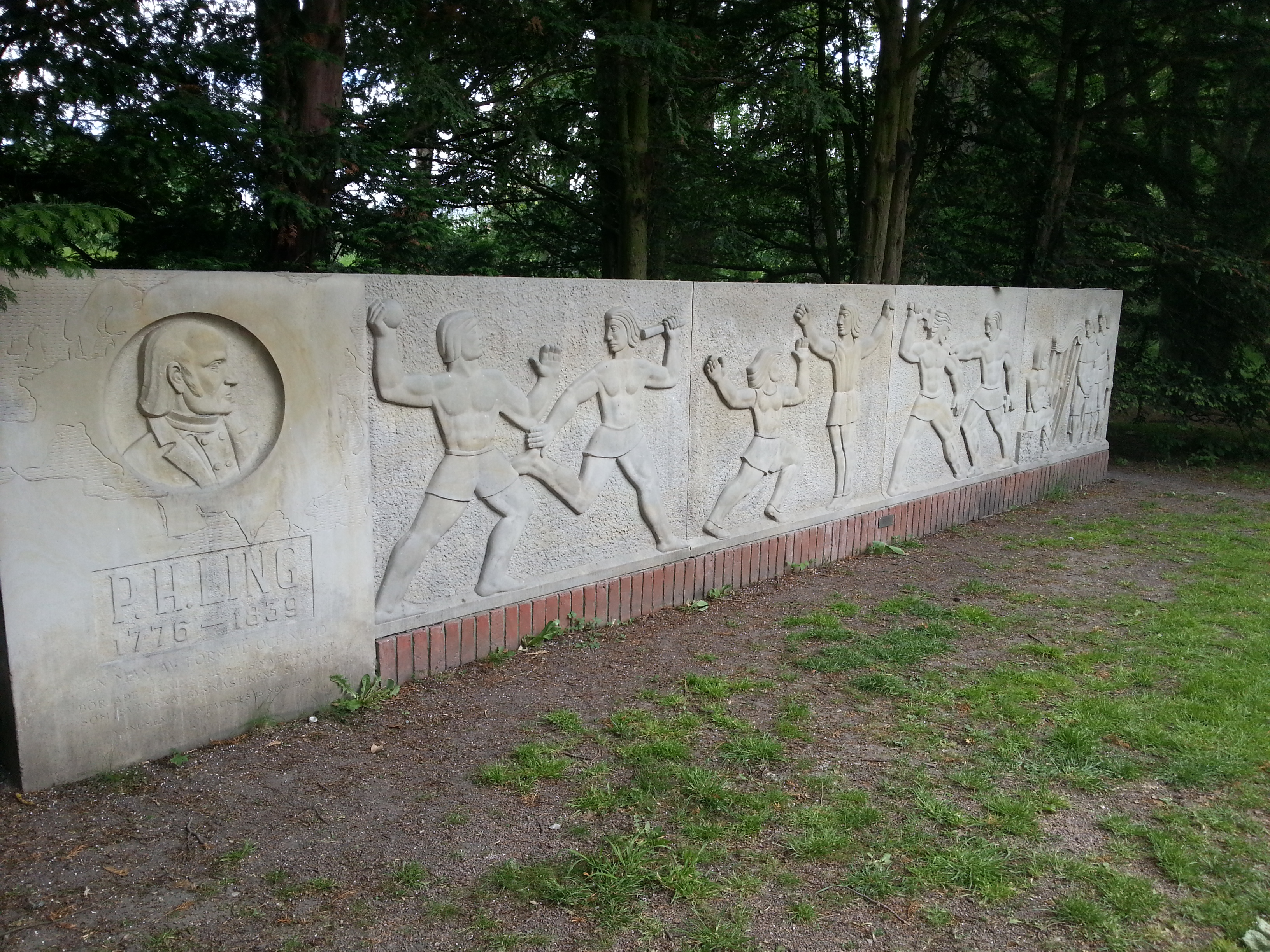 Lingmonumentet (1939) av Gunnar Nordborg, Lund It is not clear whether freedom of panorama applies to this image. This is a depiction of a building or work of art in Sweden. The depicted work is believed to be protected by copyright. According to Article 24 of the Swedish copyright act, "Works of art may be depicted if they are permanently placed on or at a public place outdoors. Buildings may be freely depicted." It has been widely accepted that this provision made distribution of depictions such as this one legal. On 4 April 2016, however, the Supreme Court of Sweden issued a statement that the first paragraph in Article 24 does not extend to publication in online repositories, and on 6 July 2017, a lower court ruled that linking to depictions of copyrighted artworks hosted on Commons in a database constitutes copyright infringement. See COM:CRT/Sweden#Freedom of panorama for more information. The second paragraph in the article, about buildings, was not evaluated in the statement or ruling. The implications of these decisions on Commons' ability to continue to distribute this and other depictions like it are currently under analysis. Reusing or linking to this file can have legal consequences, unless if the artist has died before 1 Jan 1950, to which either PD-Sweden-photo or PD-old-70 may applied. You are solely responsible for ensuring that you do not infringe the copyright belonging to someone else. See our general disclaimer for more information.